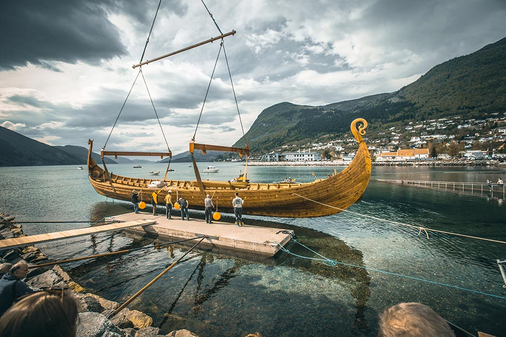 Myklebustskipet foto: Ruben Soltvedt